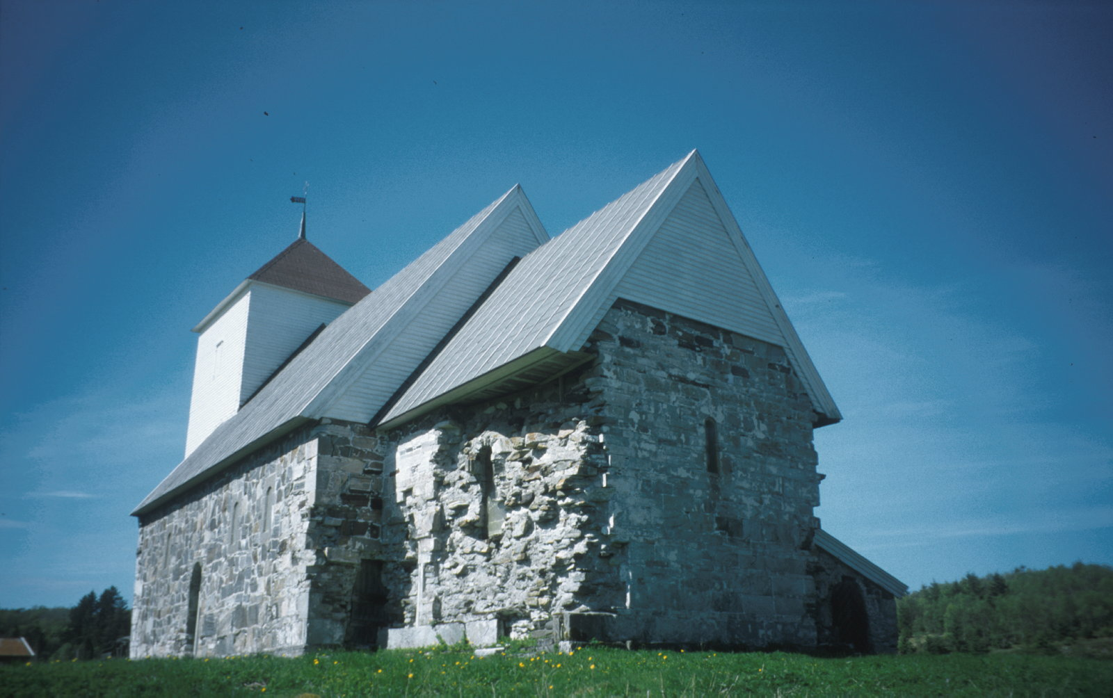 Nærøy kirke. Foto: Synnøve Haugen/Riksantikvaren.